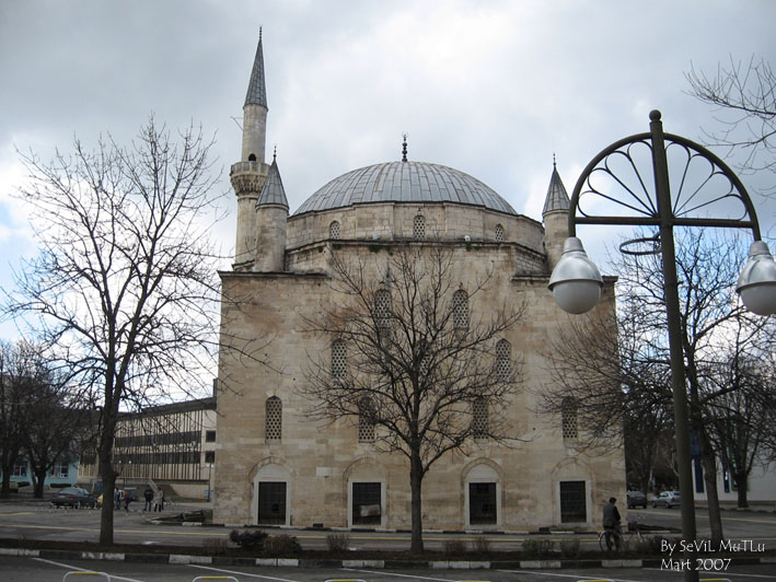 Снимка на Ибрахим паша джамия в Разград